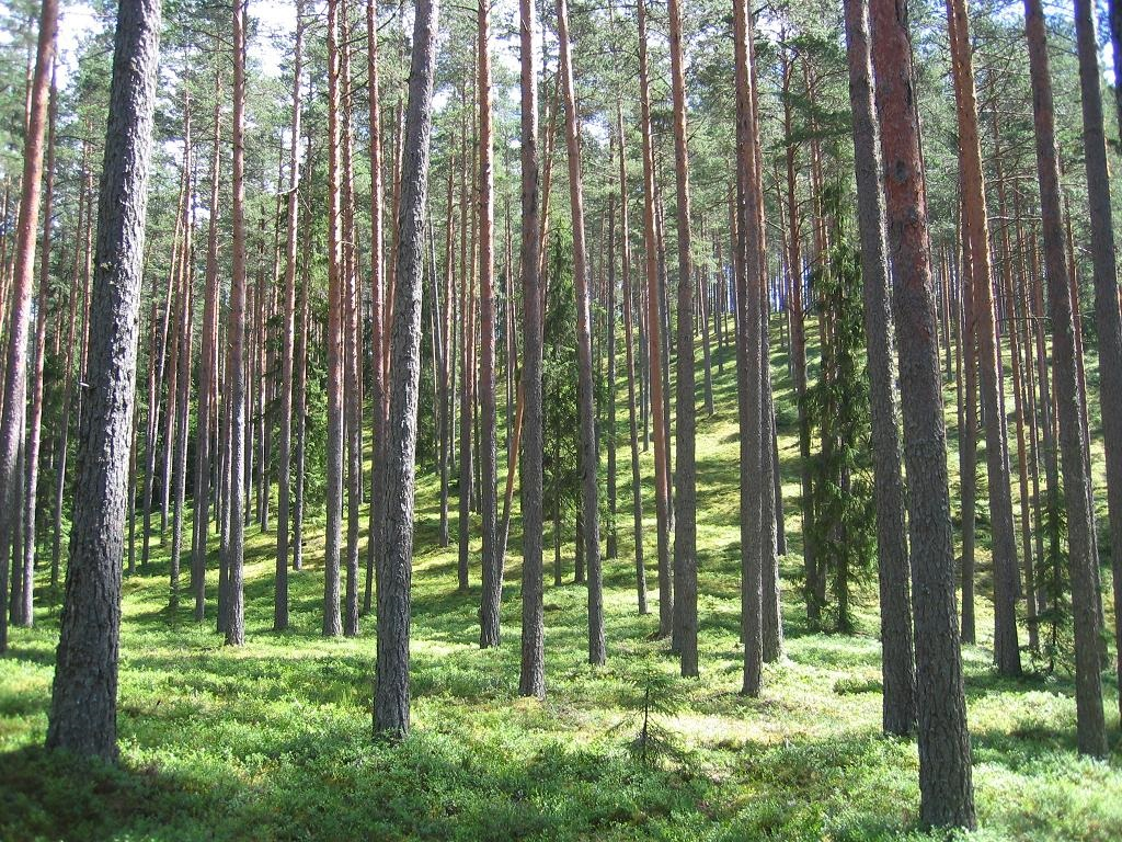 Marjumäe nõlv